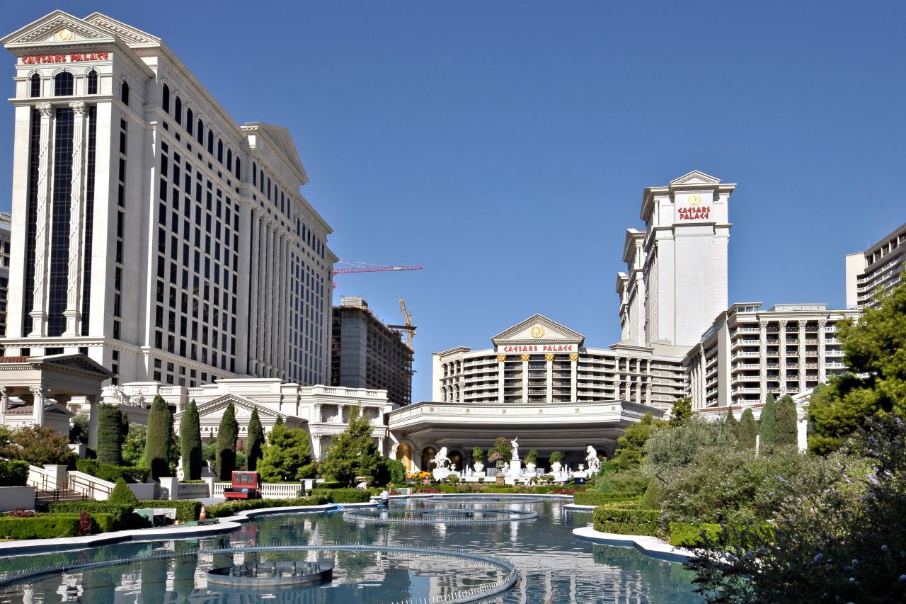 Caesar's Palace